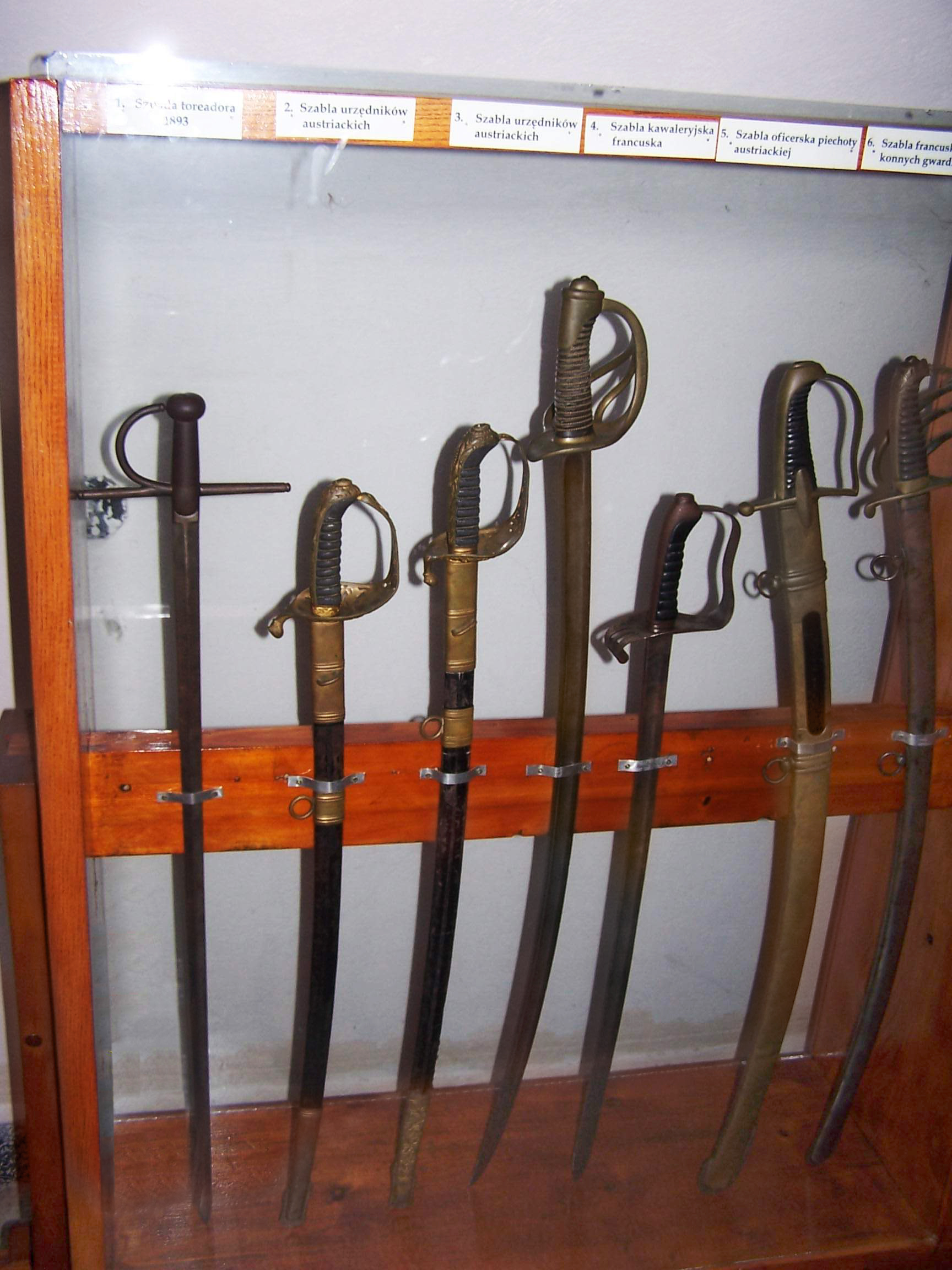 6 szablas in monastery in Szczyrzyc, Poland. Opactwo Cystersów w Szczyrzycu